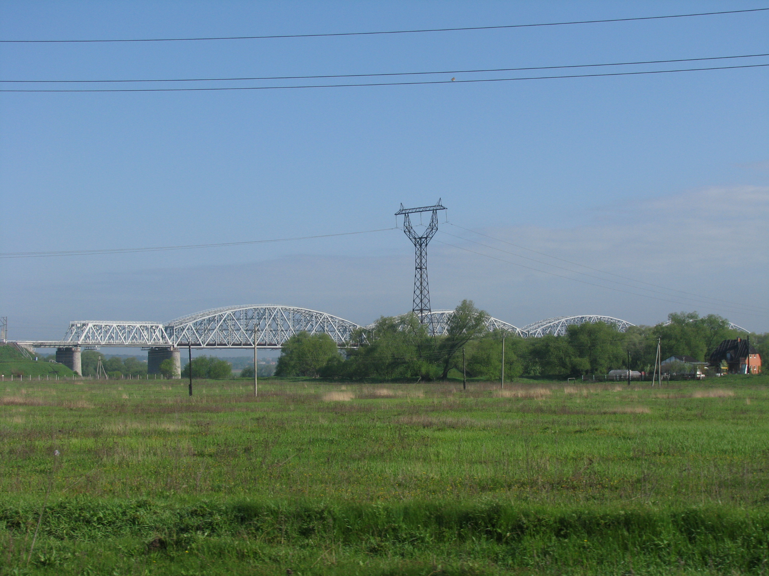 Railway bridge over Oka river in Serpukhov District near the Lukyanovo village /Железнодорожный мост через реку Оку в Серпуховском районе Московской области, недалеко от деревни Лукьяново